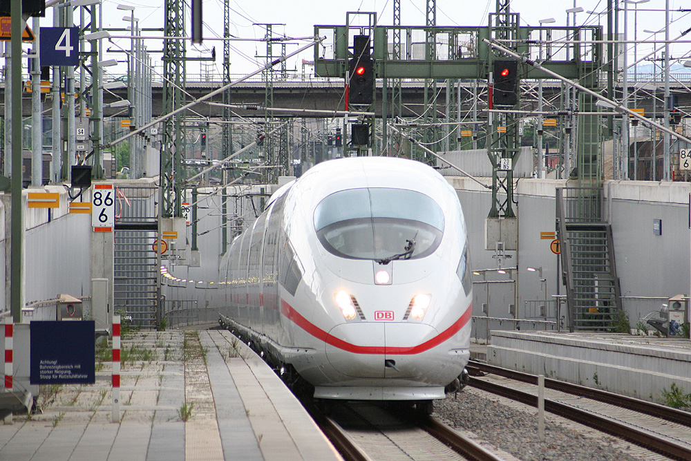 ICE3 mit Fernlicht im Bahnhof Ingolstadt Nord